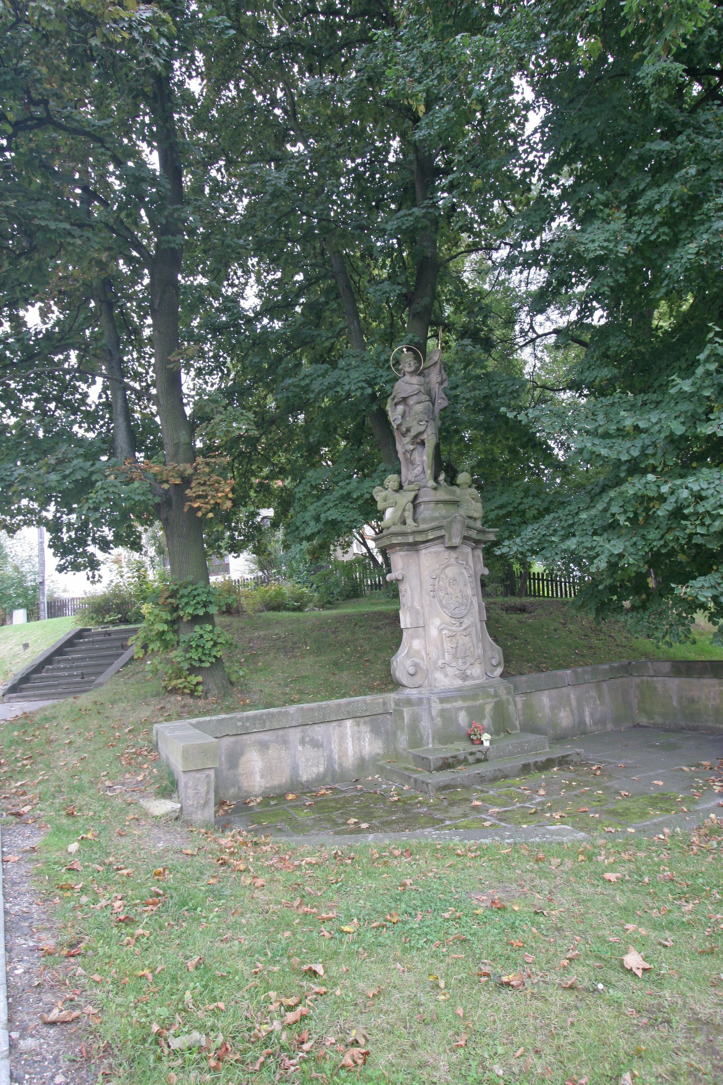 socha sv. Václava, křižovatka ulic Husova, Textilní a Hradecká, Jičín